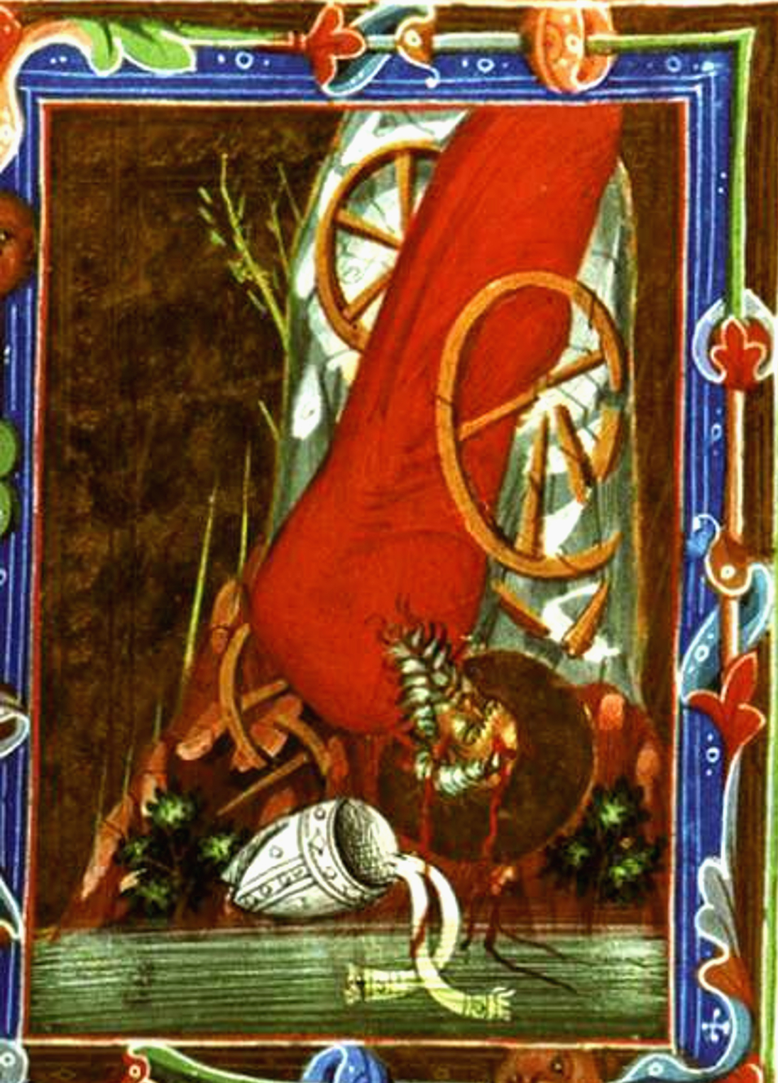 Saint Gellert, Anjou Legendarium